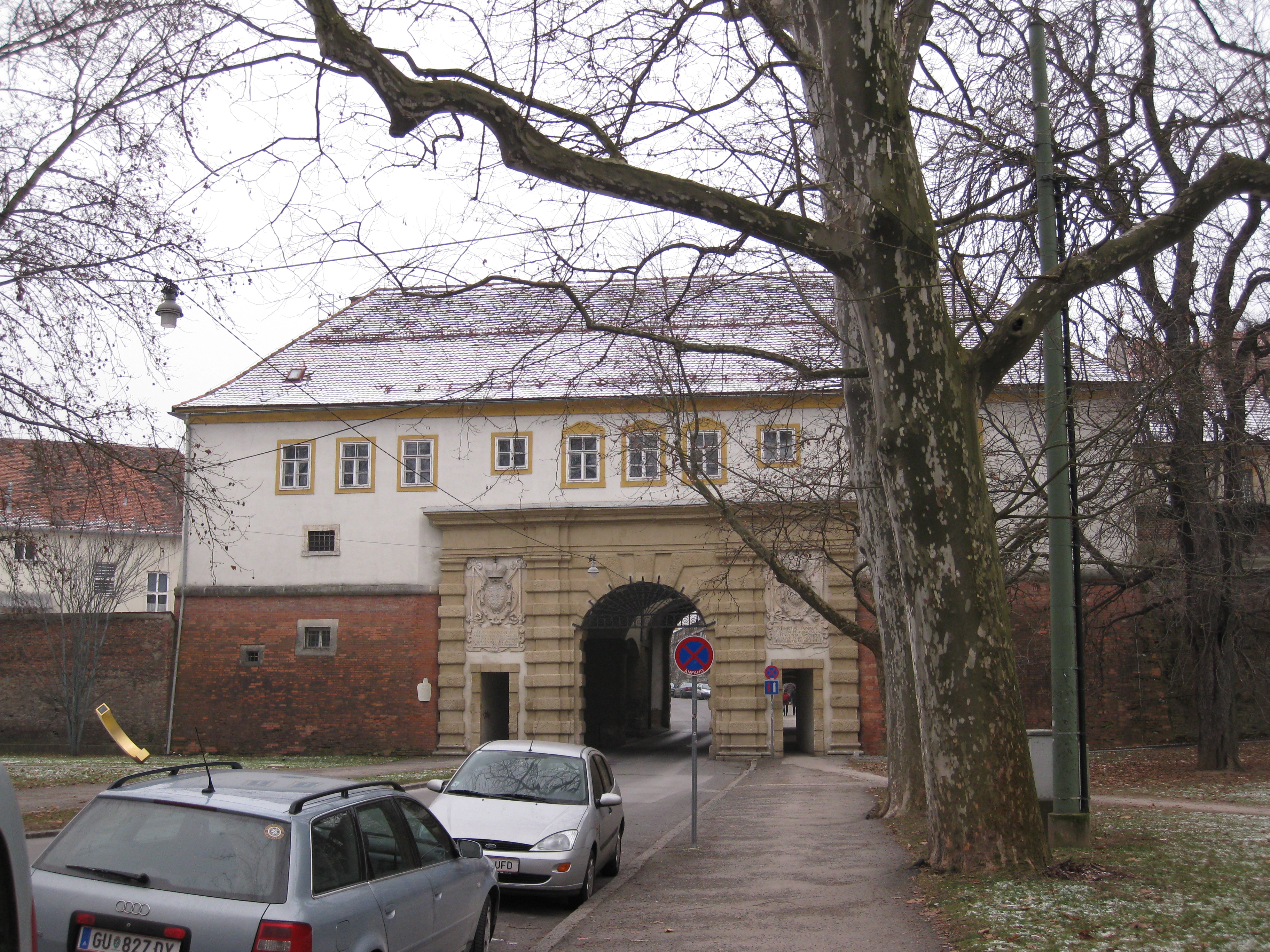 Foto des äußeren Paulustores der alten Stadtmauer in Graz (1.Bezirk)